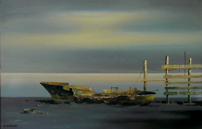 Benedek Jenő, ifj. (Csongrád, 1939. június 13.– 2019. augusztus 20.) festőművész alkotása: Öreg hajó, Év n., olajfestmény, 50x80 cm